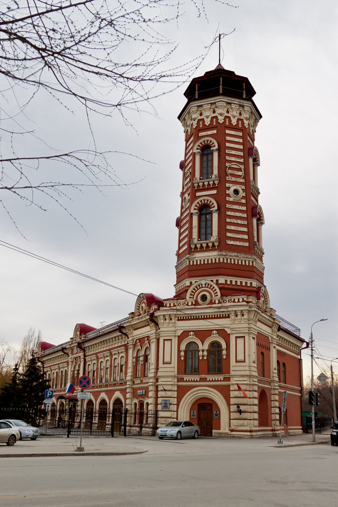 Здание царицынской пожарной части